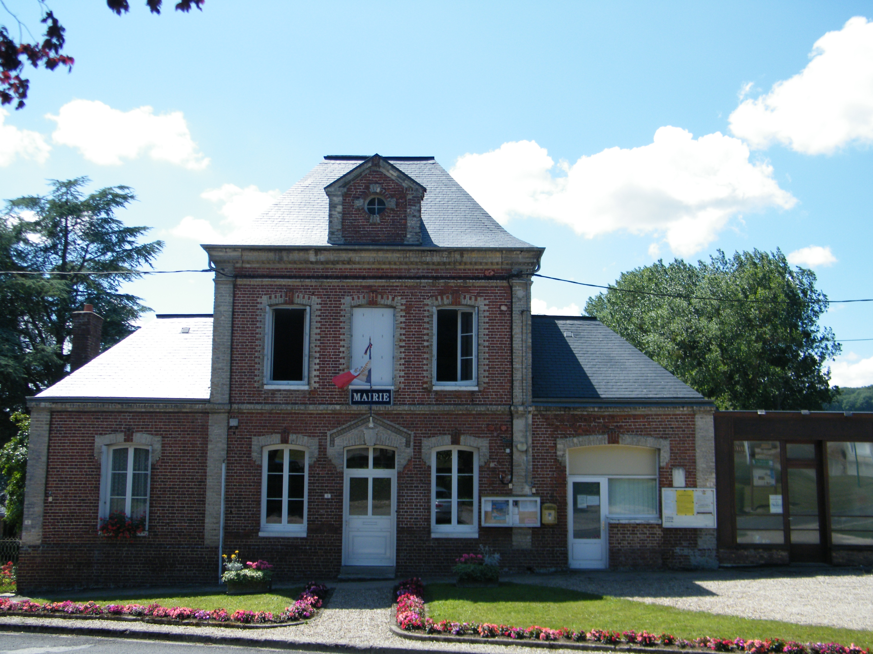 Douvrend, Seine-Maritime, France, mairie